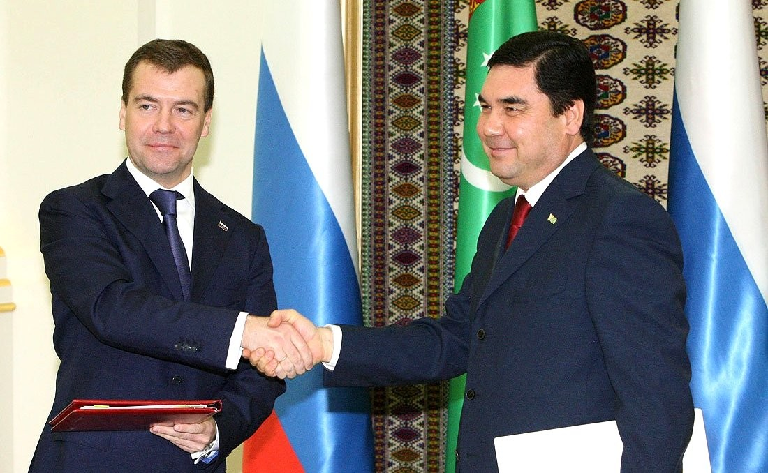 С Президентом Туркменистана Гурбангулы Бердымухамедовым.